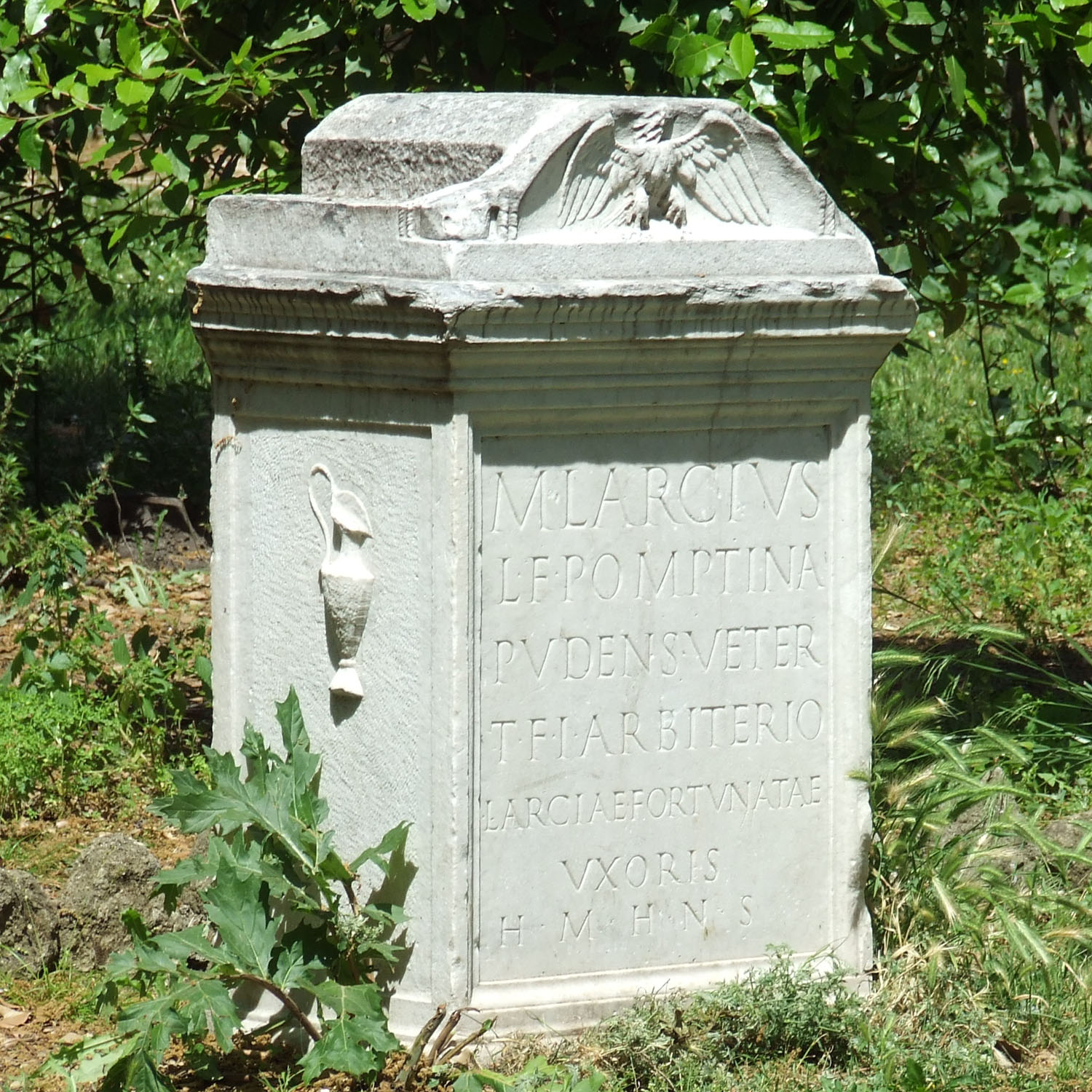 Villa Celimontana, Roma - giardini, monumento probabilmente funerario in memoria di Marcus Larcius dedicatogli dalla moglie. CIL VI 3471: M(arcus) Larcius / L(uci) f(ilius) Pomptina / Pudens veter(anus) / t(estamento) f(ieri) i(ussit) arbiterio / Larciae Fortunatae / uxoris / h(oc) m(onumentum) h(eredem) n(on) s(equetur)